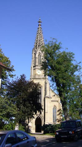 Westansicht der Berger Kirche